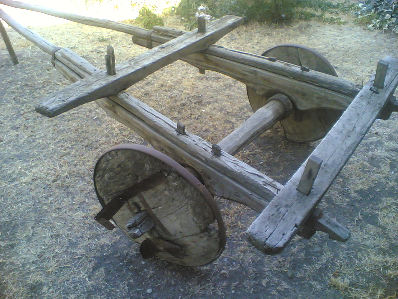 kağnı